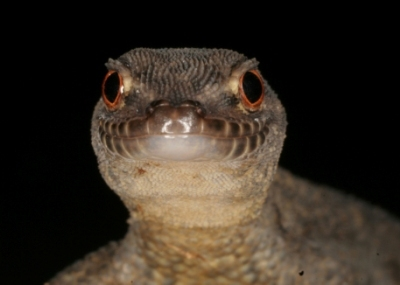 Gymnodactylus darwinii